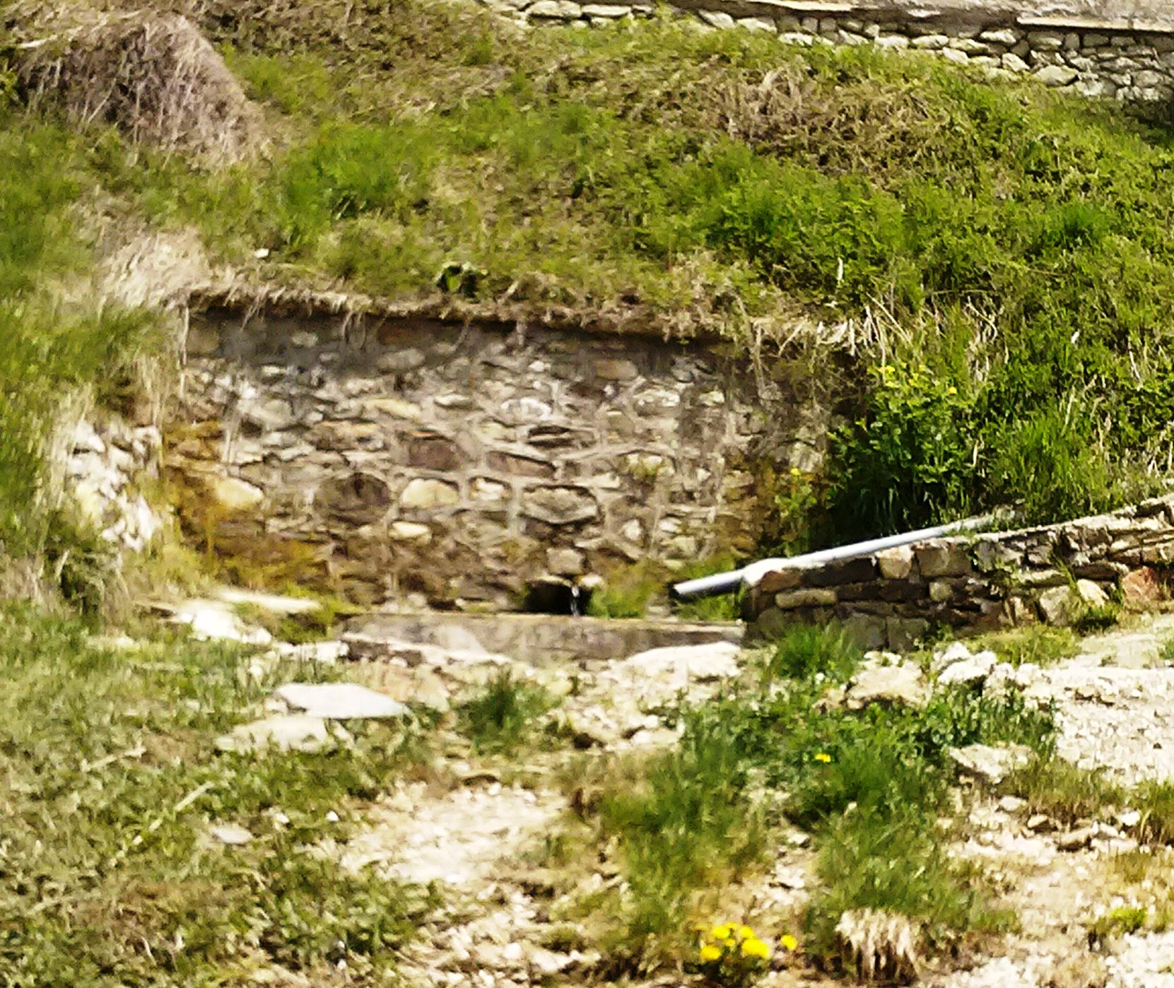 Το σημείο όπου θα επιχειρείτο η δολοφονία του παπα-Σταύρου Τσάμη